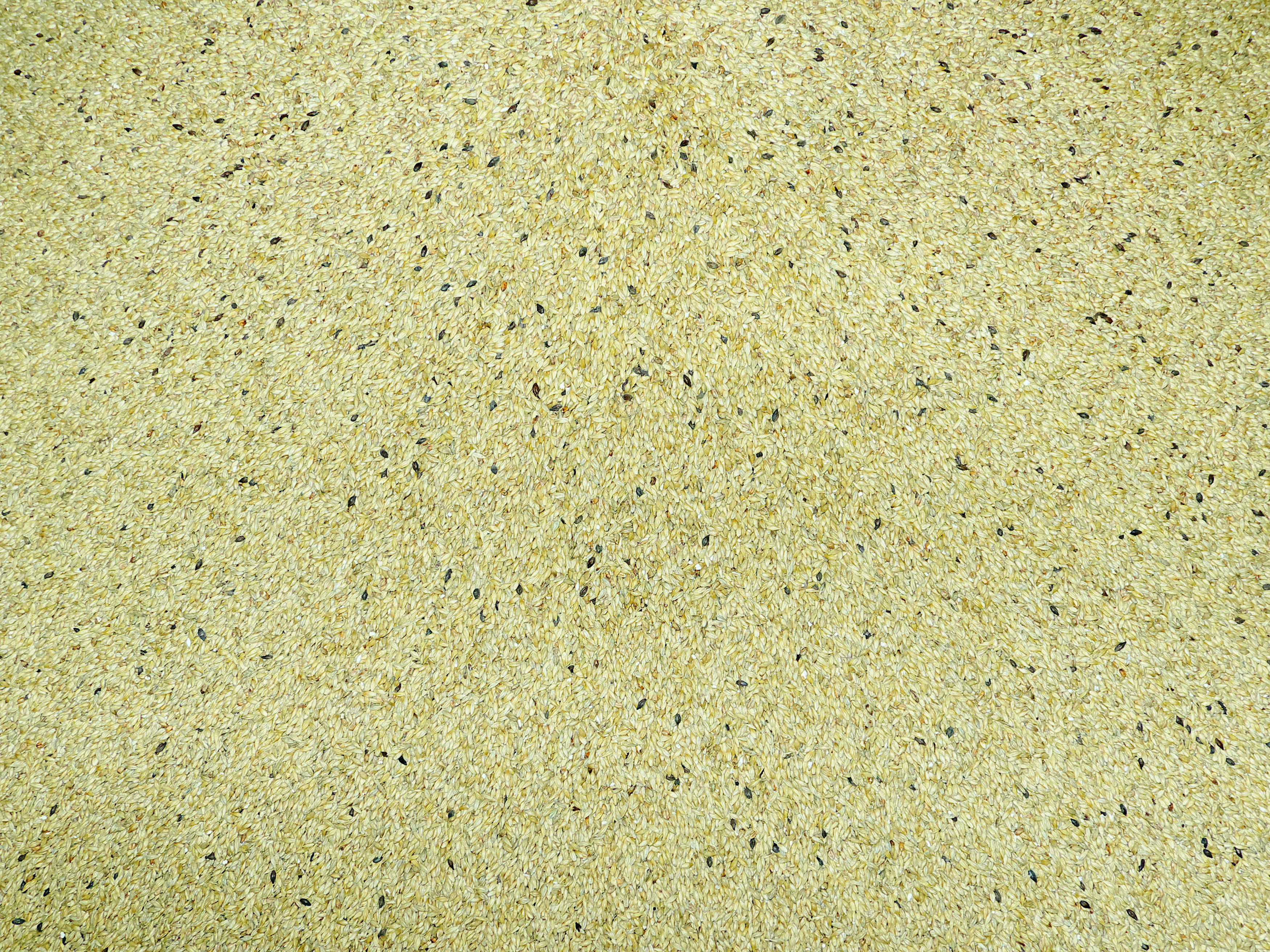 Braumalzgemisch im Trichter der Schrotmühle der Brauerei Aying, Bayern, Deutschland